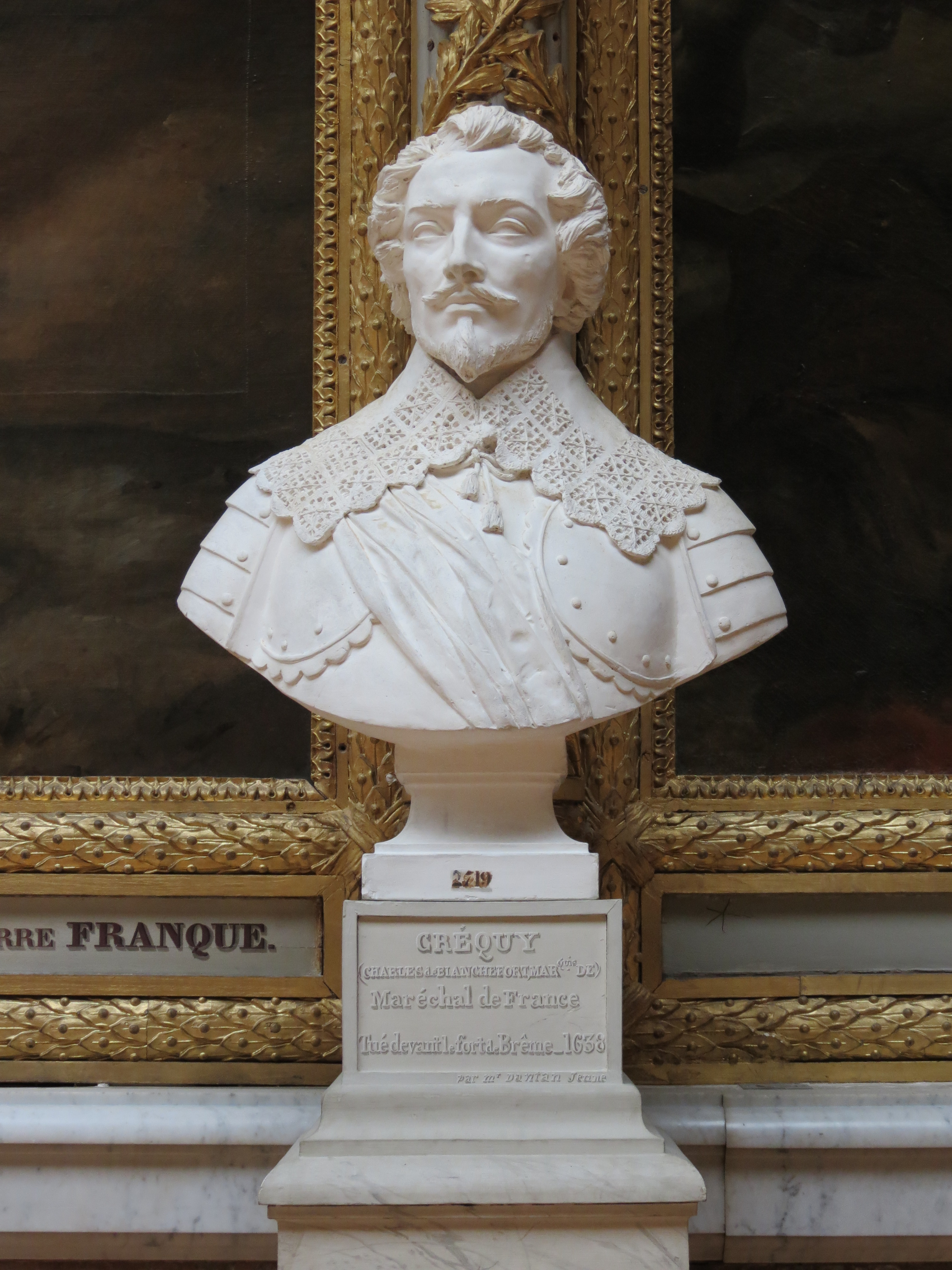 Buste de Charles de Blanchefort, marquis de Créquis, maréchal de France, sculpté par Dantan jeune.